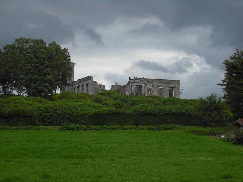 Chateau fort de la commune ornaise de Cerisy Belle Etoile, en Basse Normandie.